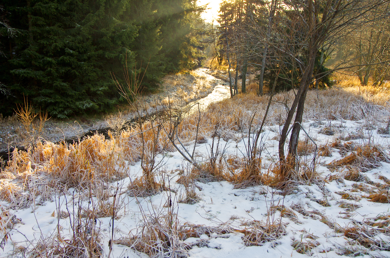 Pramenský potok v místě mezi obcemi Nová Ves a Mnichov, Slavkovský les